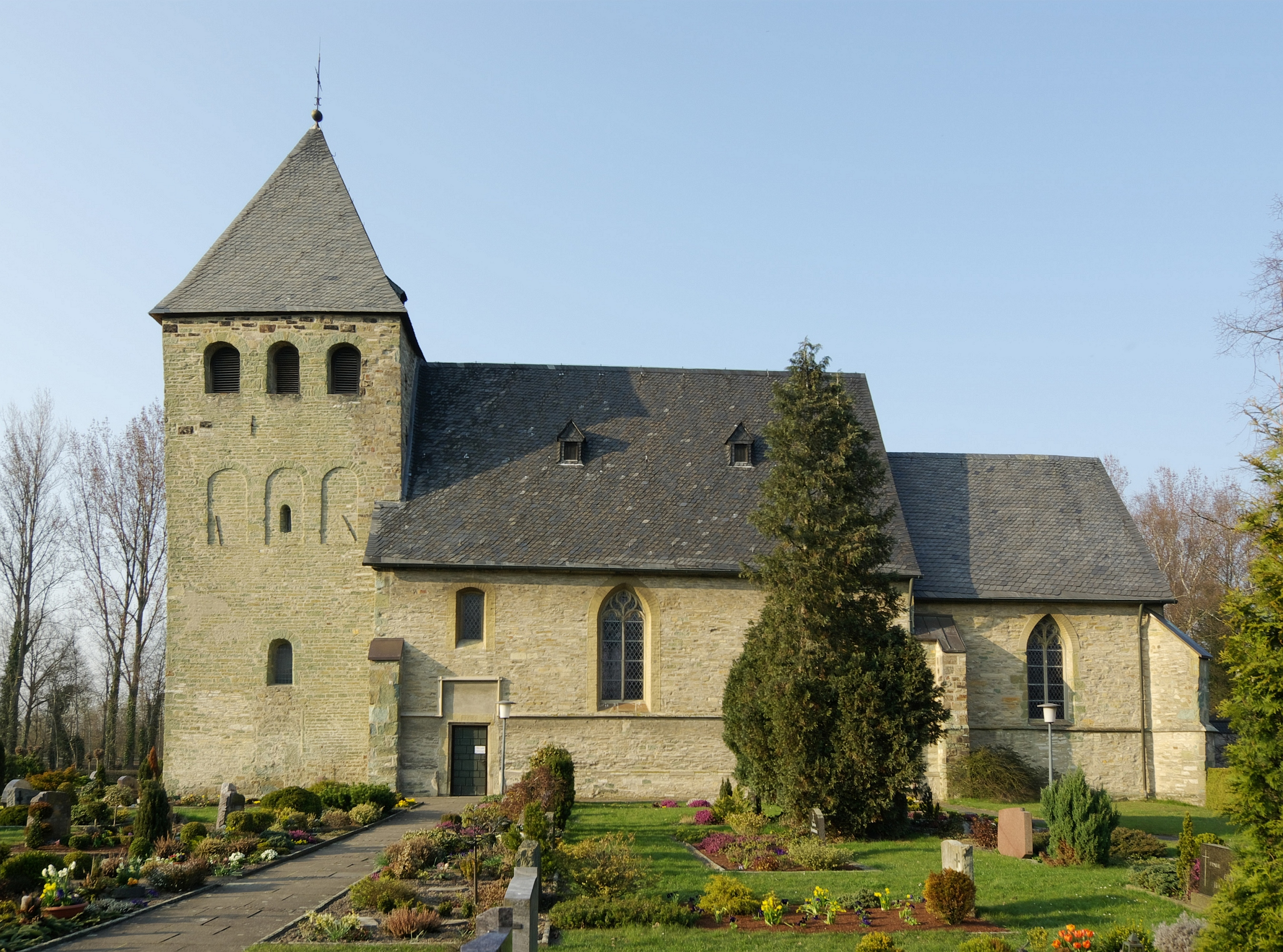 Evangelische Dorfkirche in Uentrop, Hamm, Nordrhein-Westfalen